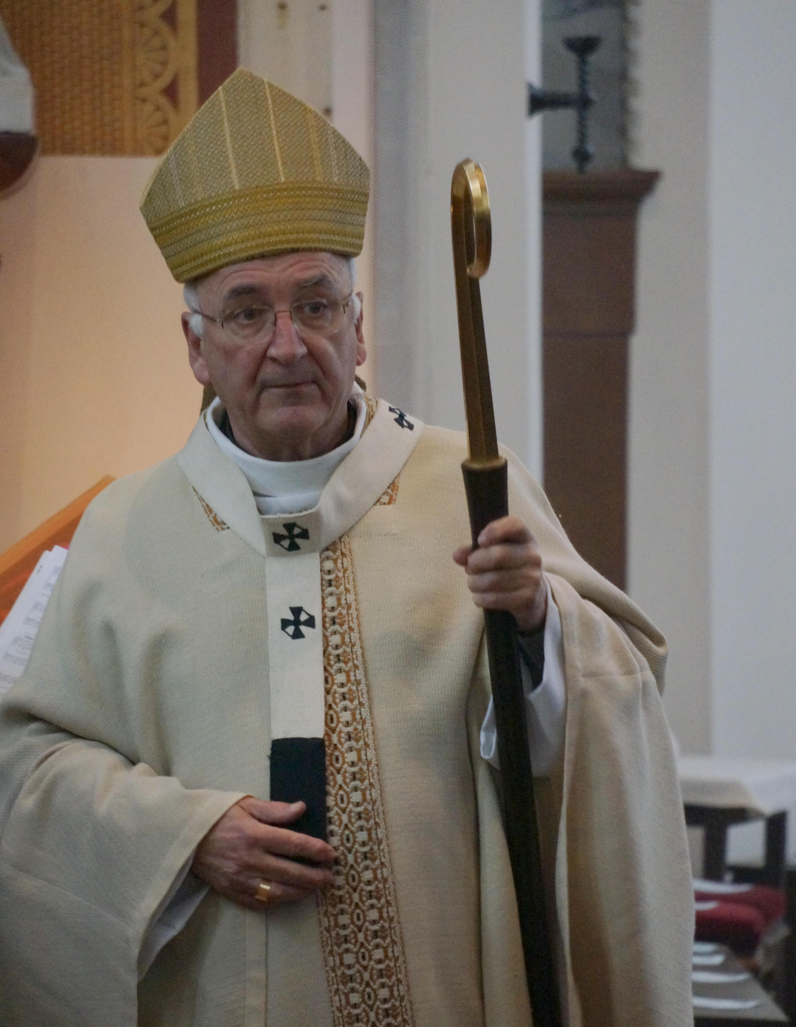 T.Jordan en la basilique sainte Clotilde.